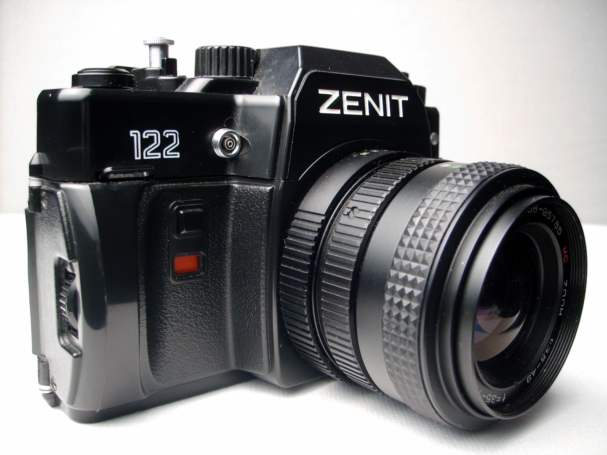 Cámara fotográfica marca Zenit, modelo 122. Hecha en la U.R.R.S.